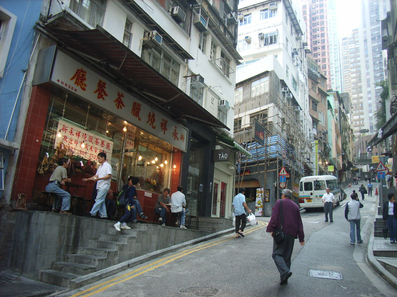 Peel Street, Central, Hong Kong